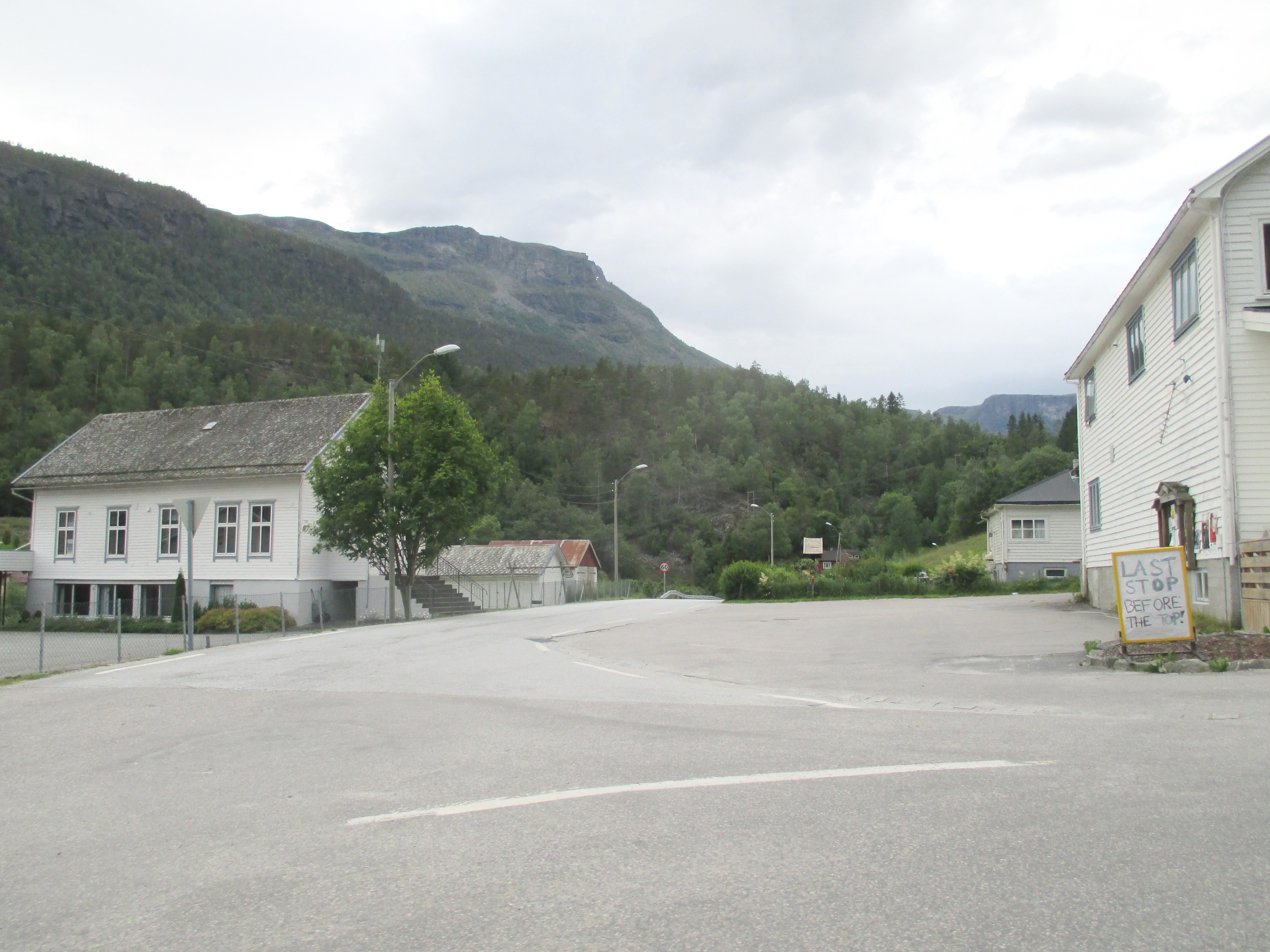 Fylkesvei 332 tar av fra fylkesvei 55 ved Fortun.